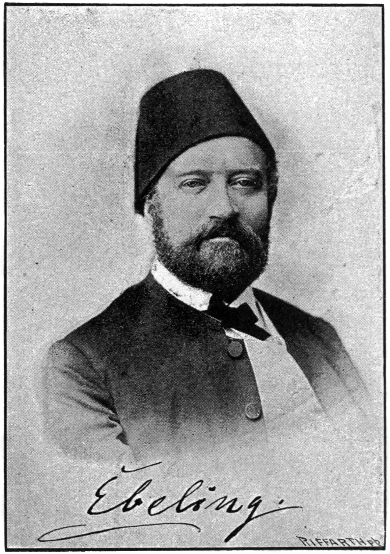 Porträt: Adolf Ebeling. In: Napoleon III. und sein Hof. Denkwürdigkeiten, Erlebnisse und Erinnerungen aus der Zeit des Zweiten französischen Kaiserreichs 1851–1870. Albert Ahn, Köln und Leipzig, 1. Band, 2. Auflage, 1892